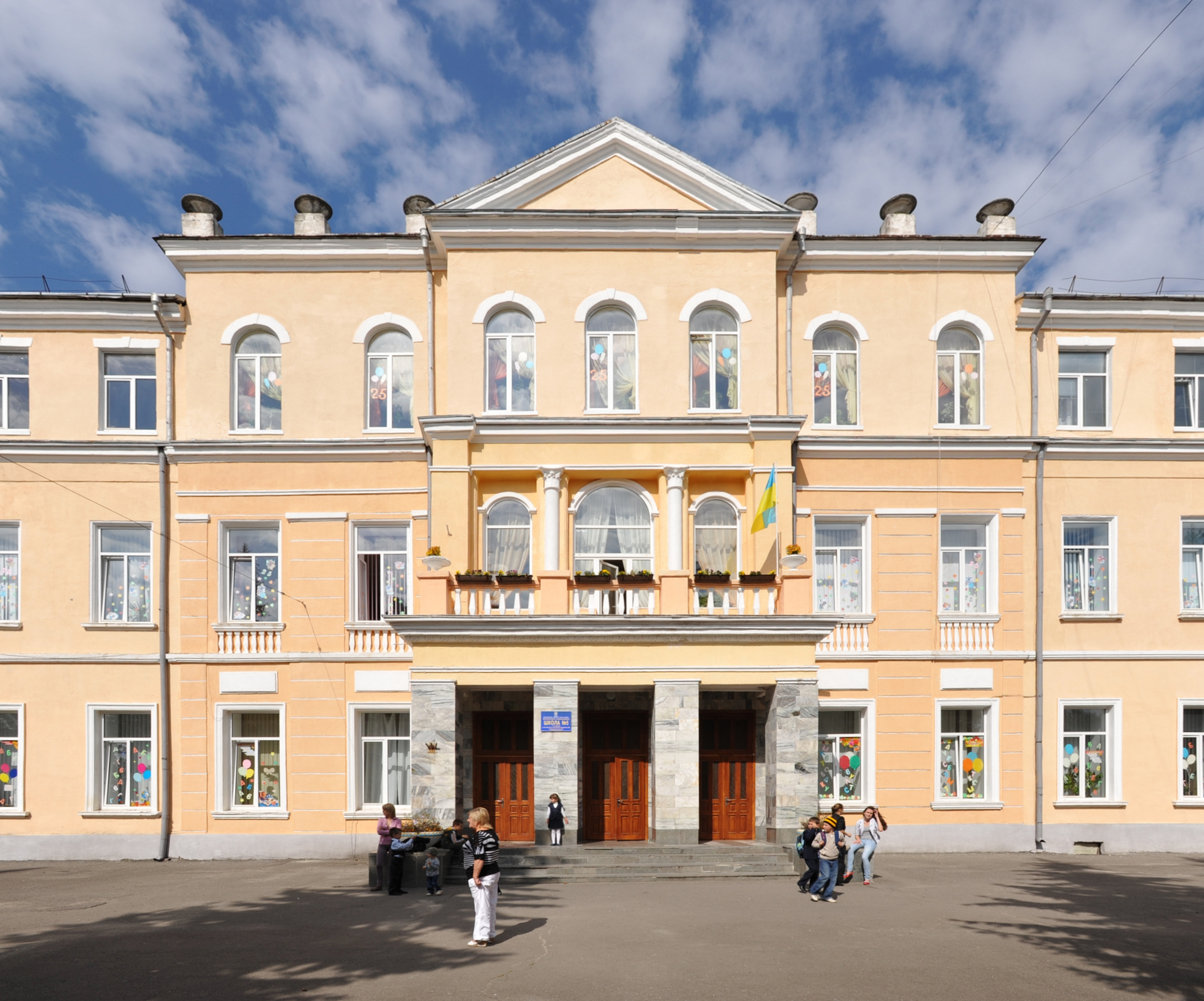 Школа ім. Королеви Ядвіги (мур.), нині — школа № 5 на вул. Камінна, 2 в Тернополі.